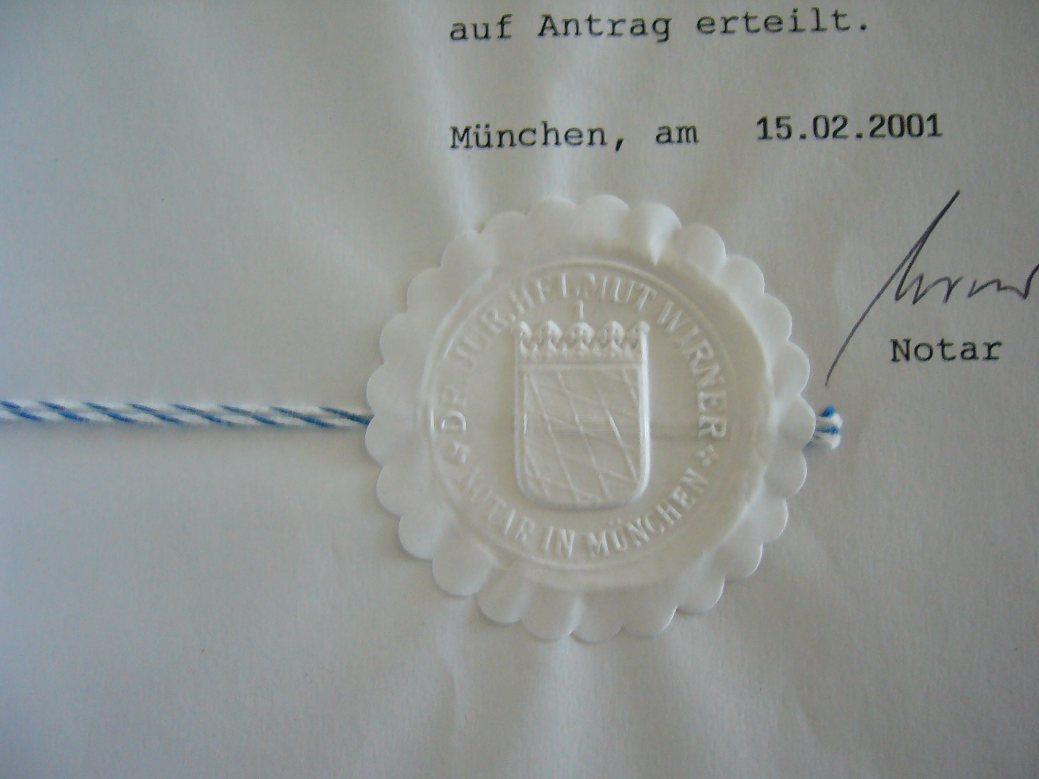 Siegelmarke in Ausführung als Prägesiegel eines bayerischen Notars auf einer Urkunde vom 15. Februar 2001, in der Umschrift oben der Name des Notars, unten „NOTAR IN MÜNCHEN“, und mit dem kleinen bayerischen Staatswappen als Siegelbild. § 3 der Verordnung zur Ausführung des Gesetzes über das Wappen des Freistaates Bayern (AVWpG) bestimmt „Das kleine Staatswappen führen außerdem: 1. […] 2. Die Notare Die Umschrift im Dienstsiegel enthält im unteren Halbbogen den Namen des Notars und die Wörter ‚Notar in …‘ (Ort).“ […]